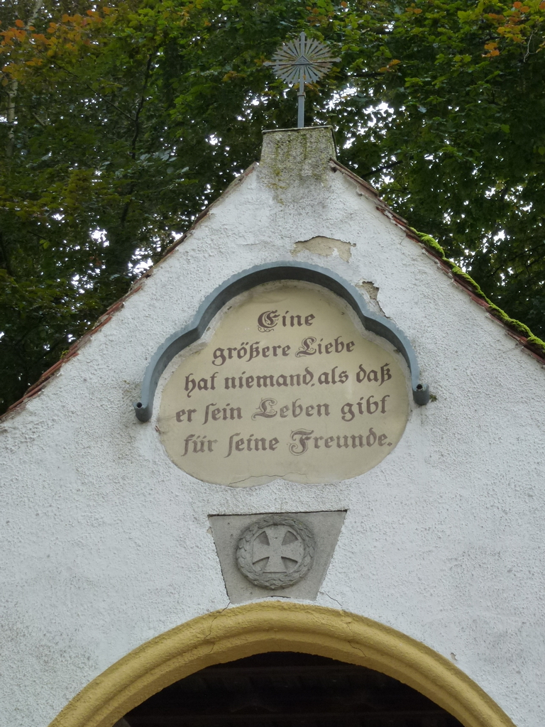 Ansicht von OstenThis is a photograph of an architectural monument.